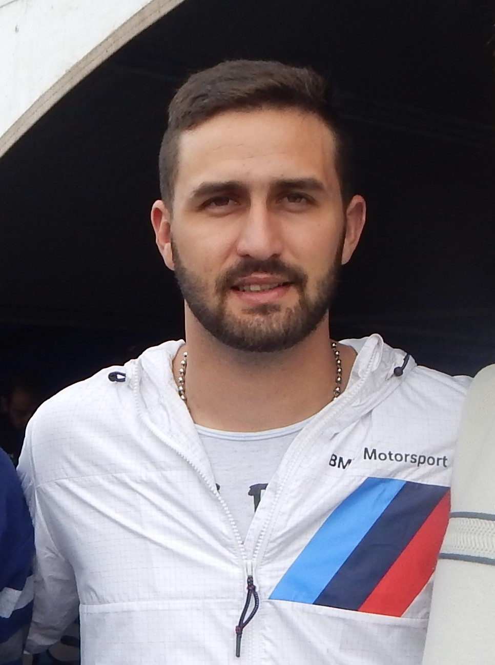 Marcos Muchiut, TC Pista Rafaela 2019.